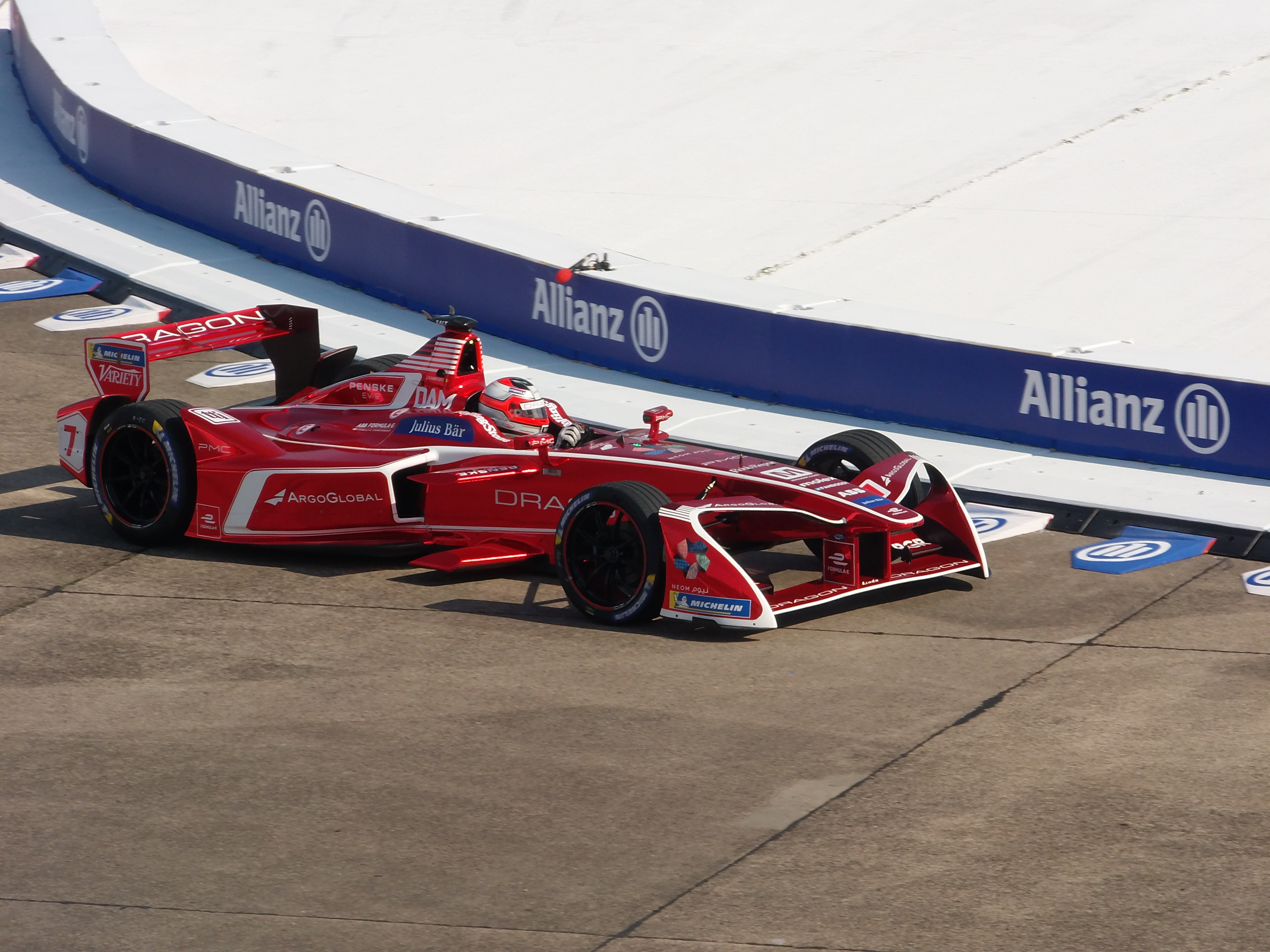 Jérôme D’Ambrosio im PENSKE EV-2 beim Berlin E-Prix 2018